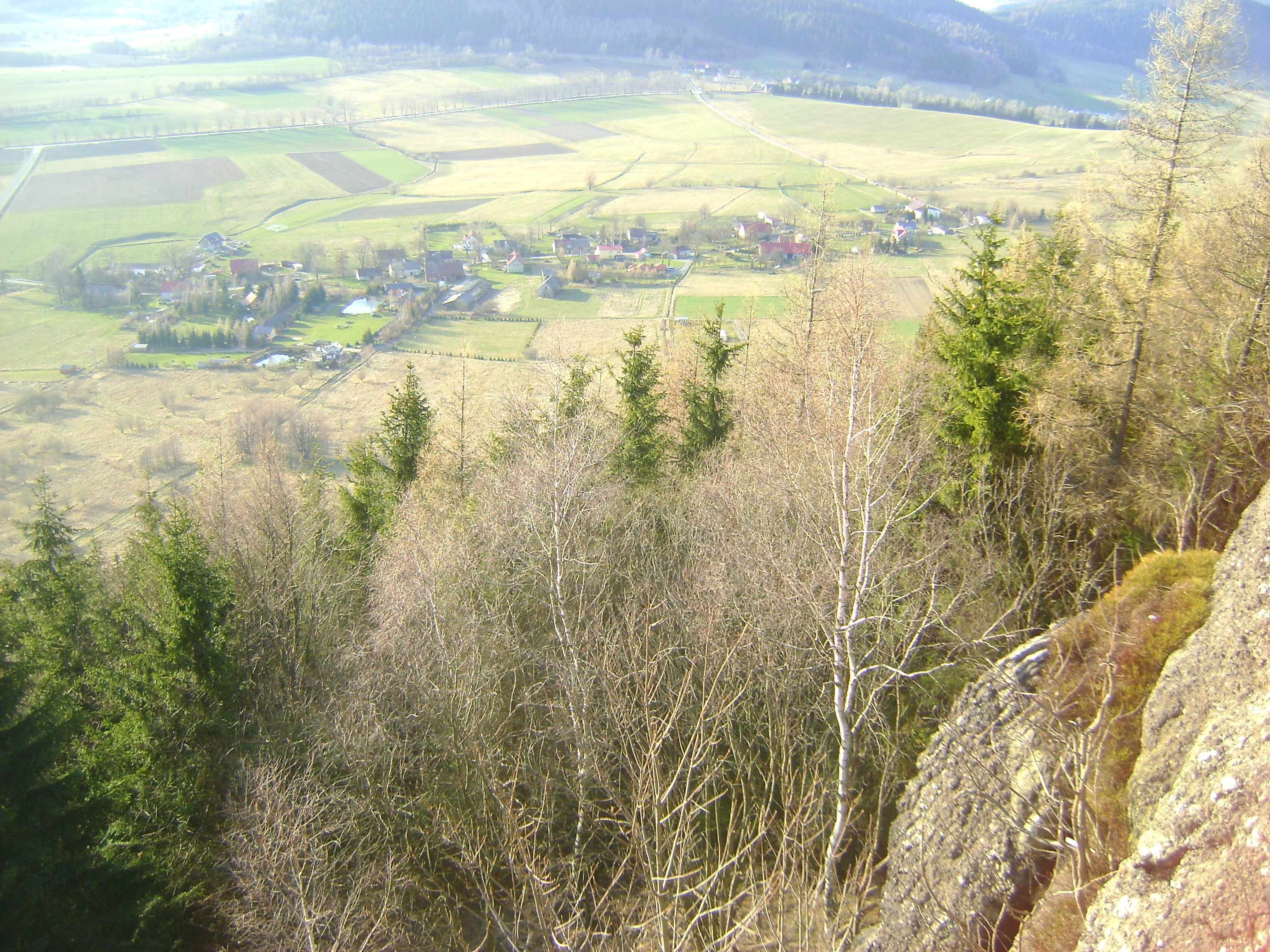 Paprotki – wieś w Polsce położona w województwie dolnośląskim, w powiecie kamiennogórskim, w gminie Lubawka.